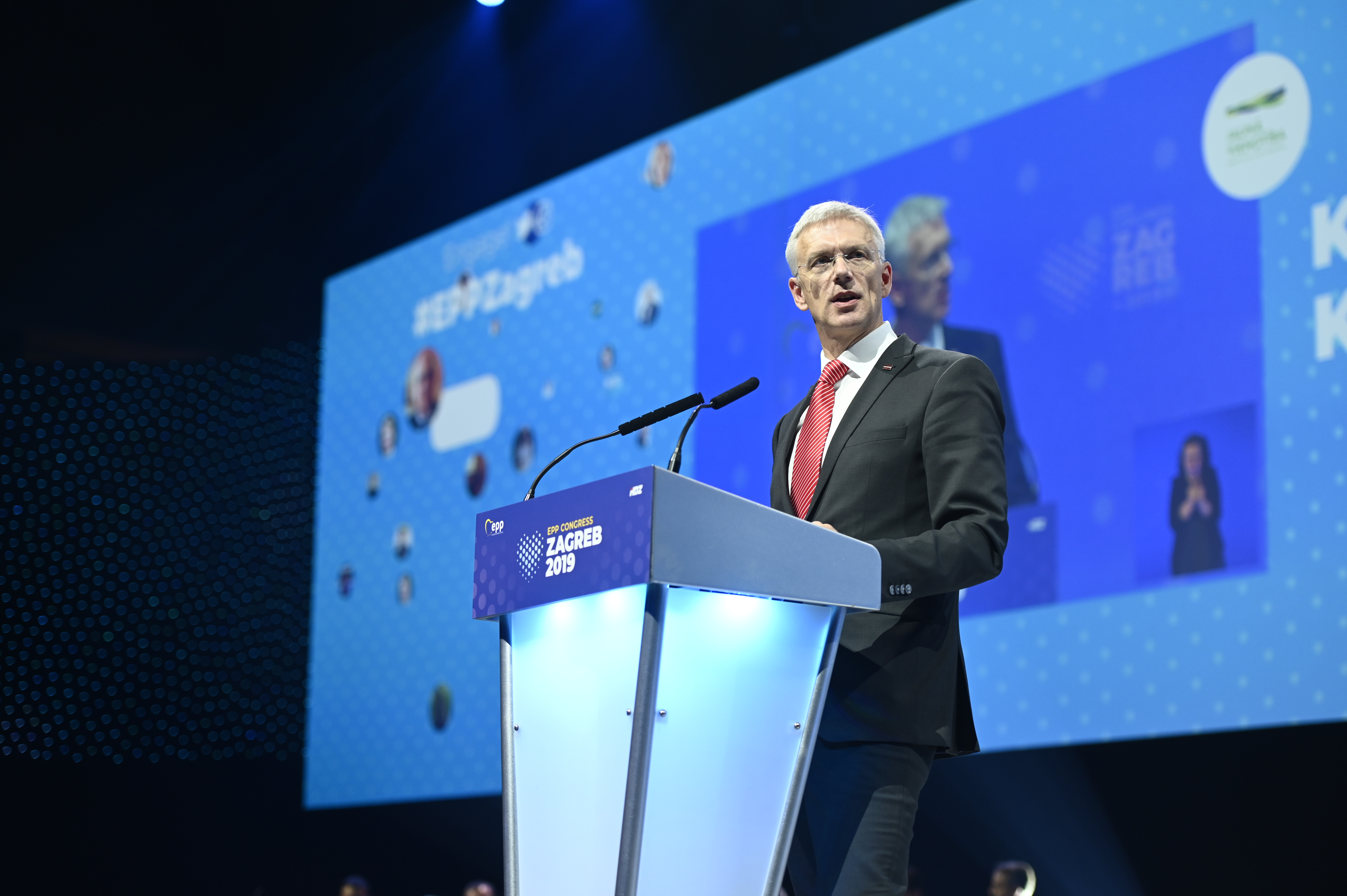 20-21 November 2019